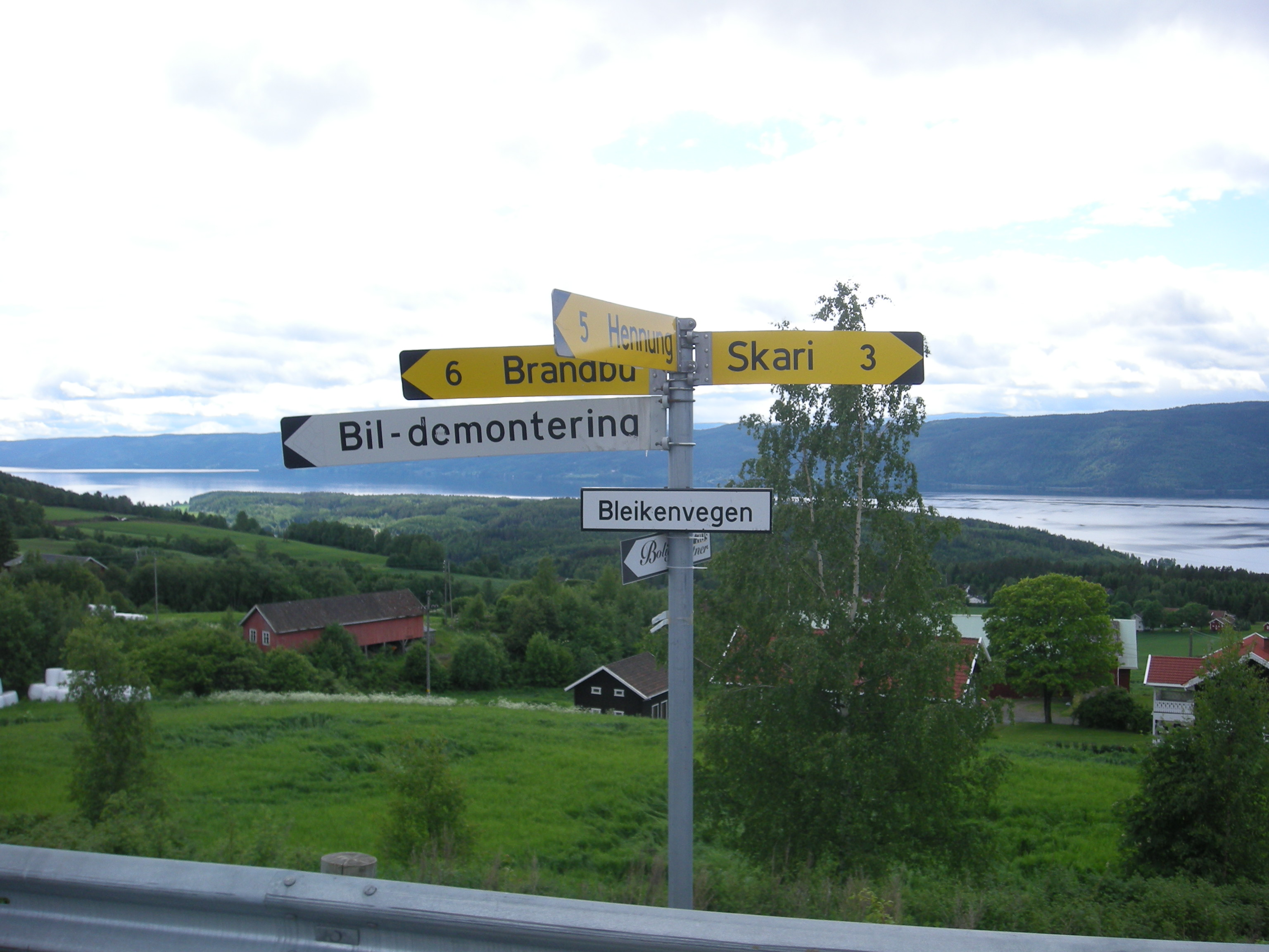 Bleikenvegen (fylkesvei 2316, tidl. 45) like ved Bleiken stasjon